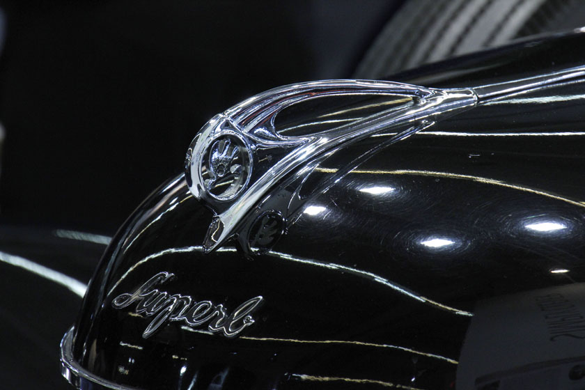 1939 Skoda Superb OHV_IMG_0107